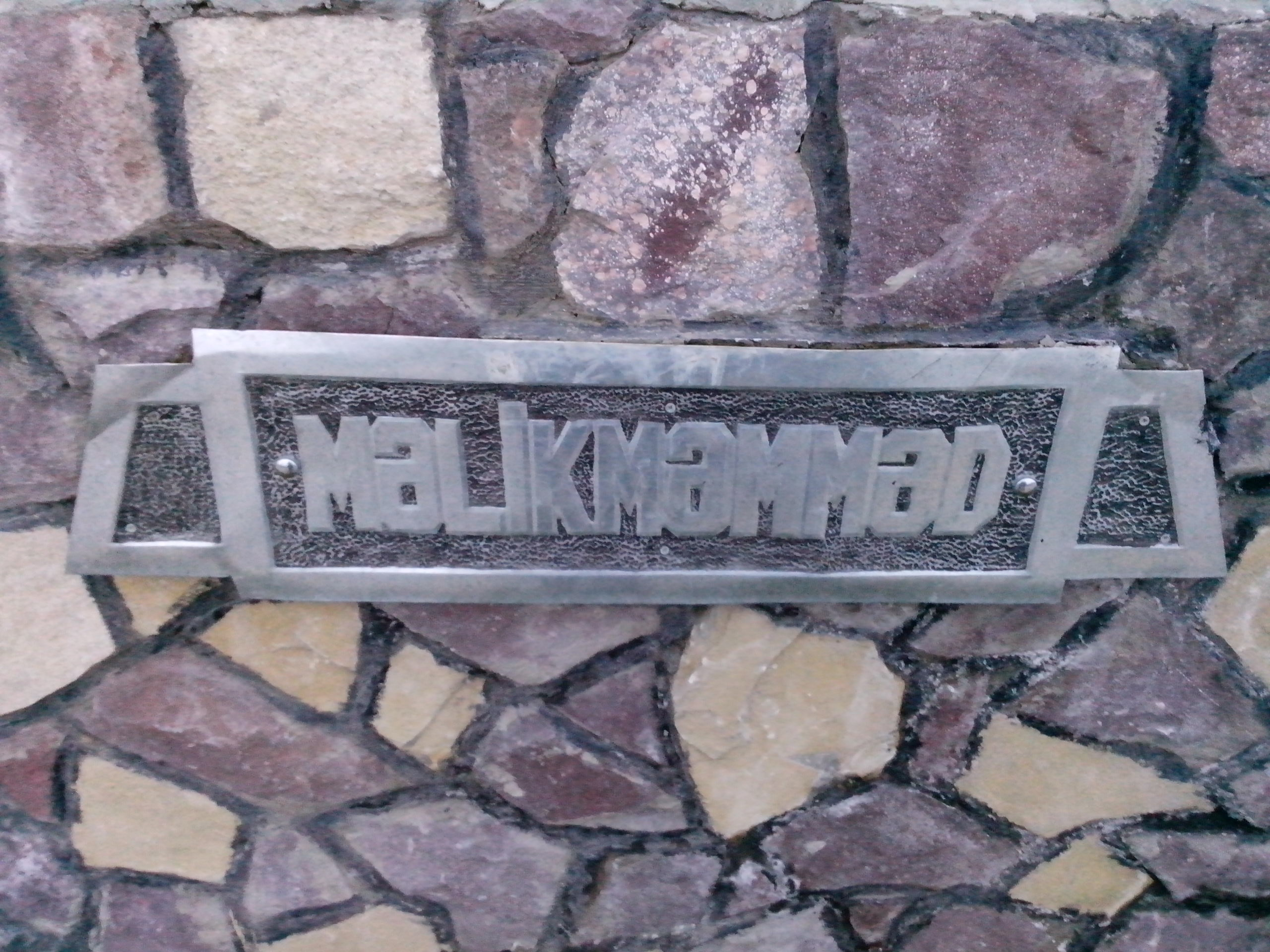 Məlikməmməd. Xaçmaz, Çənlibel parkı